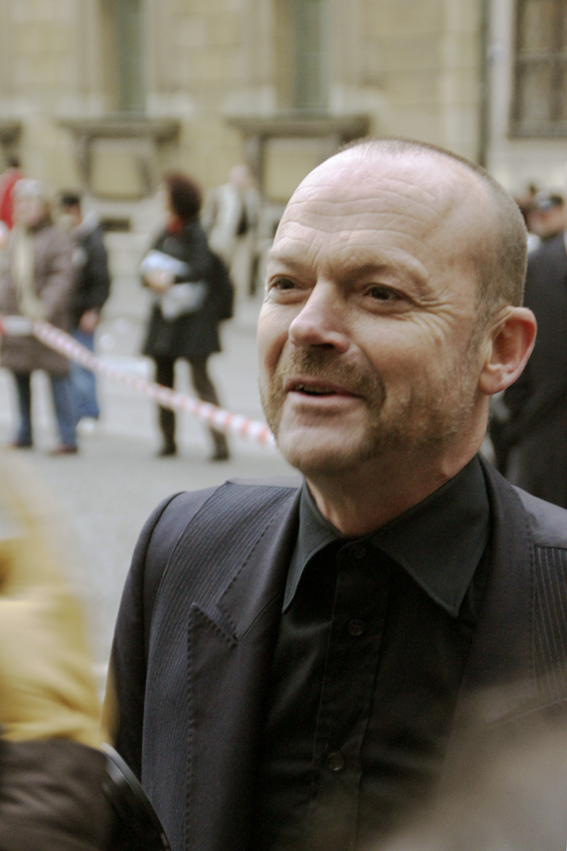 Wolfgang Flatz, österreichischer Aktionskünstler, Bühnenbildner, Musiker und Komponist, geboren am 4. September 1952 in Dornbirn. Hier kurz vor seiner öffentlichen Performance im Rahmen der Verleihung des "Nuclear-Free Future Awards 2008" auf dem Odeonsplatz in München.